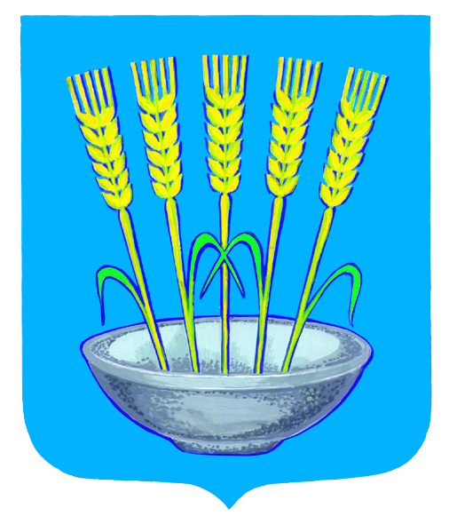 Herb Żarnowa